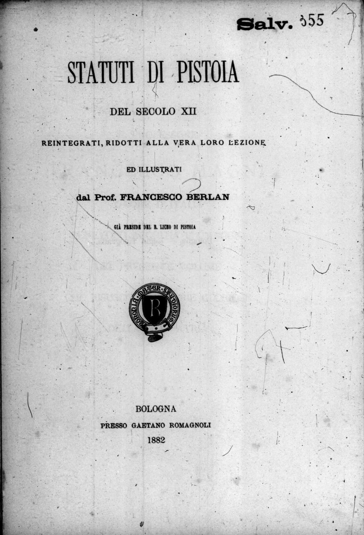 Frontespizio